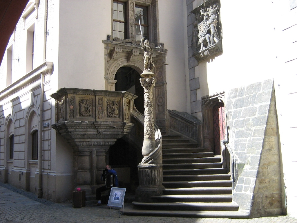 Görlitz, Rathausportal mit der Justiziasäule.